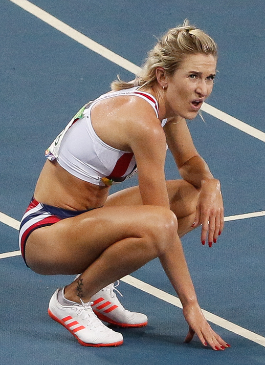 Rio de Janeiro - A queniana Vivian Jepkemoi Cheruiyot vence final e bate recorde olímpico dos 5 mil metros nos Jogos Rio 2016, no Estádio Olímpico (Fernando Frazão/Agência Brasil)